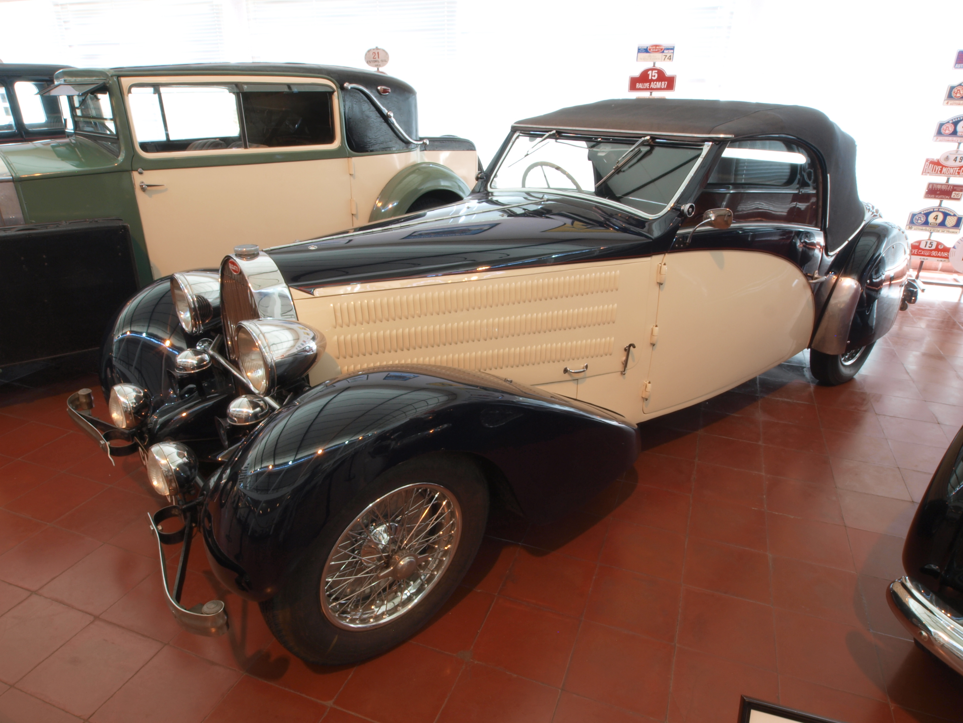 Photographed at the Caramulo museum, 'Museu do Caramulo', Caramulo, Portugal. OLYMPUS DIGITAL CAMERA